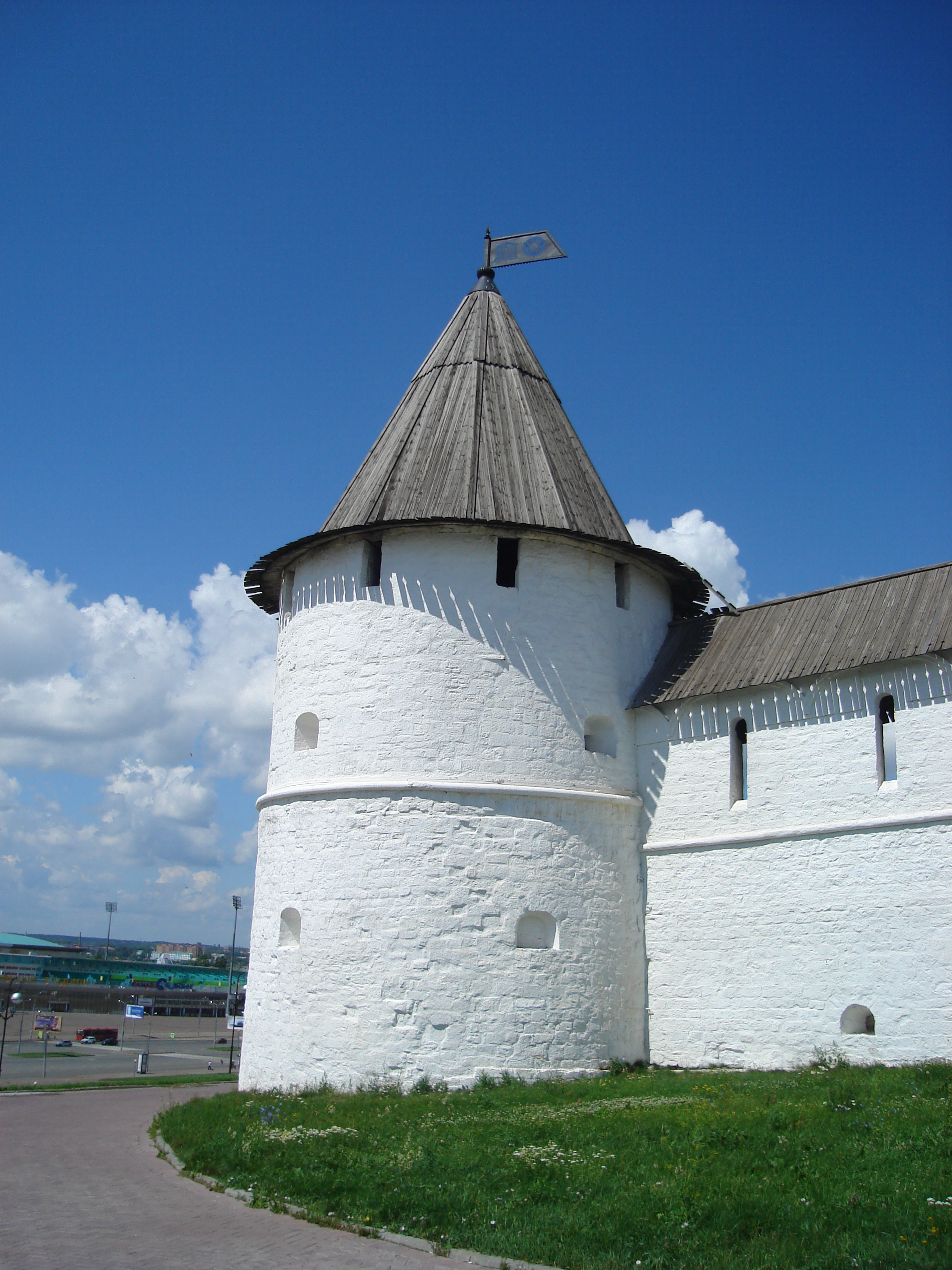 Kazan Kremlin